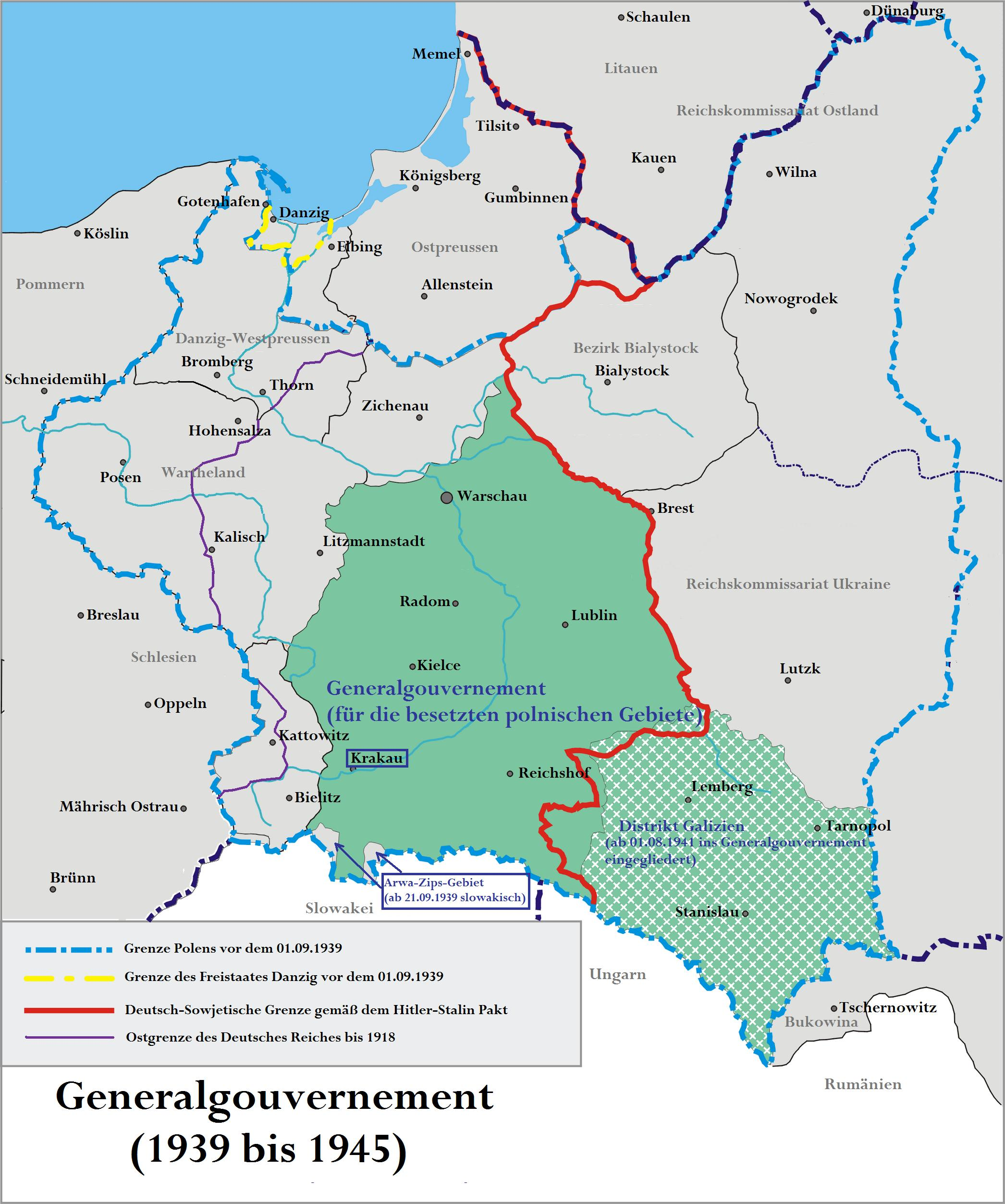 Karte des Generalgouvernement